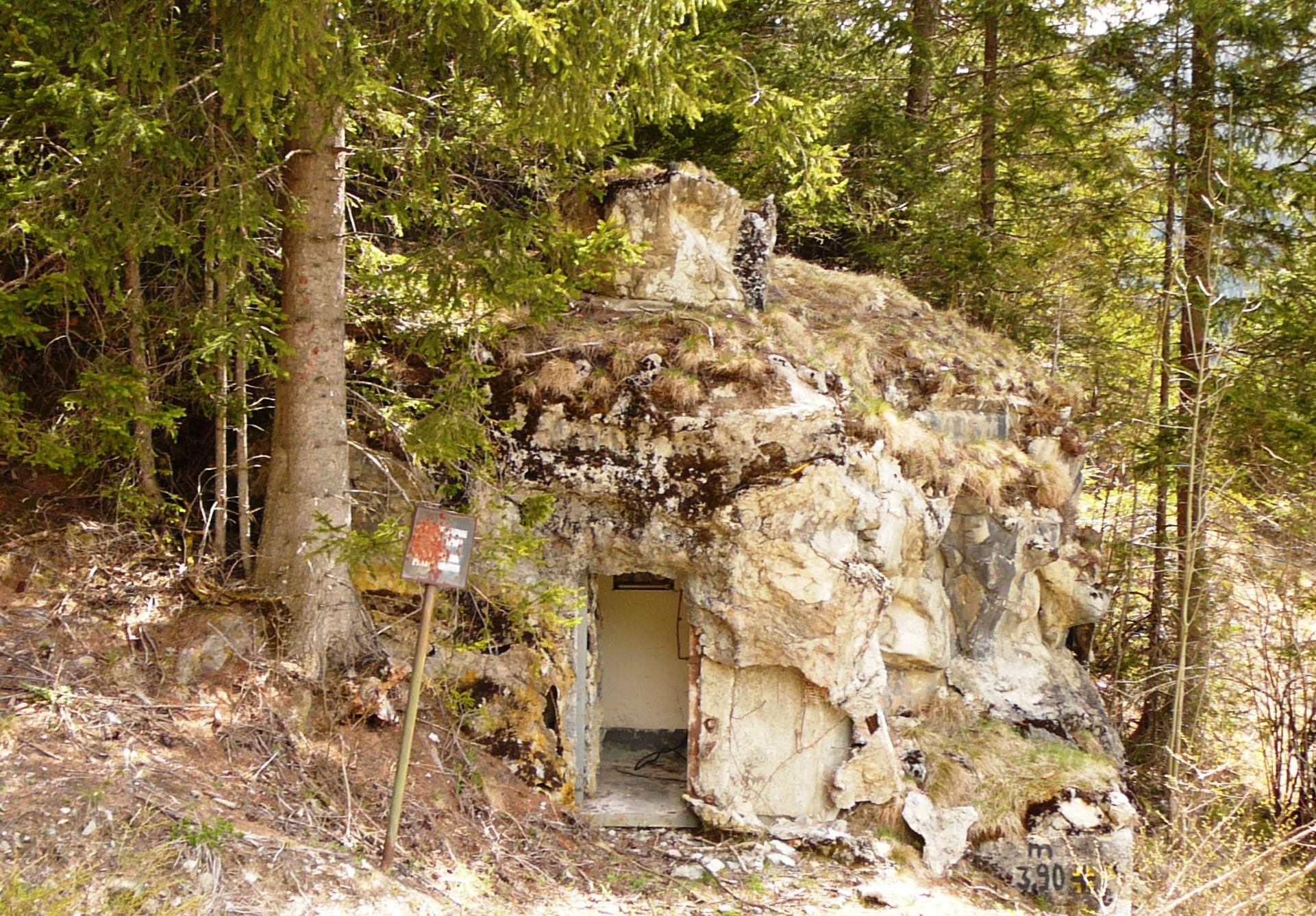 opera 3, sbarr drava